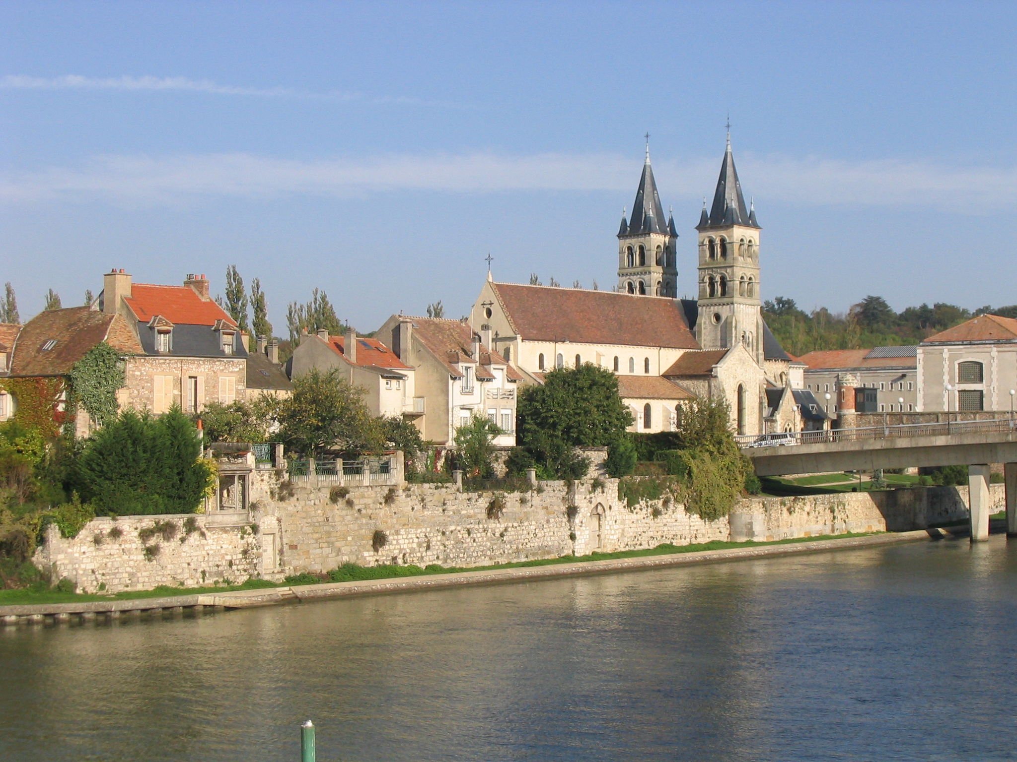 L'île Saint-Étienne et la collégiale Notre-Dame, à Melun (France). Prise de vue à partir de la rive opposée de la Seine (sud).